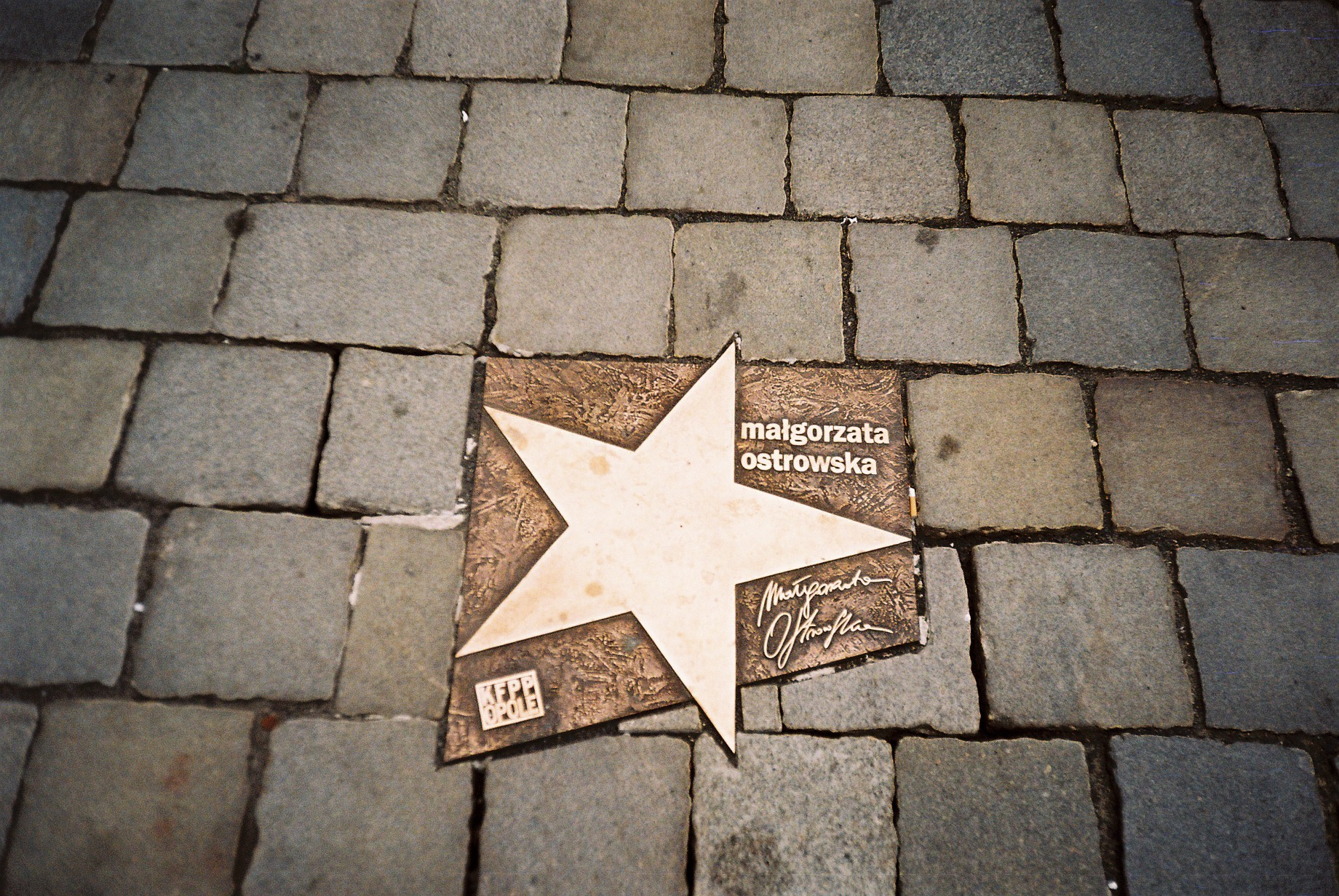 Gwiazda Małgorzaty Ostrowskiej w Opolu. Template:Małgorzata Ostrowska's star in Opole, Poland